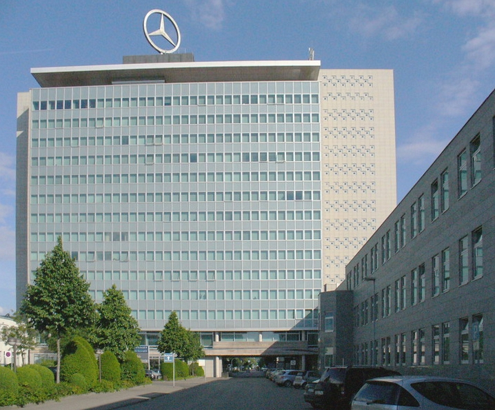 Daimler Stuttgart-Untertuerkheim Zentrale